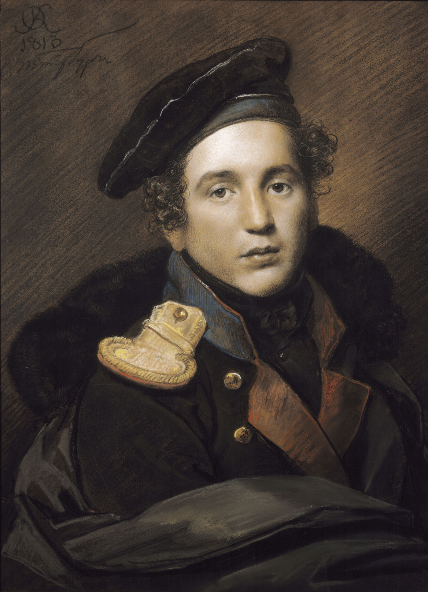 Орест Кипренский Портрет Петра Алексеевича Оленина 1813